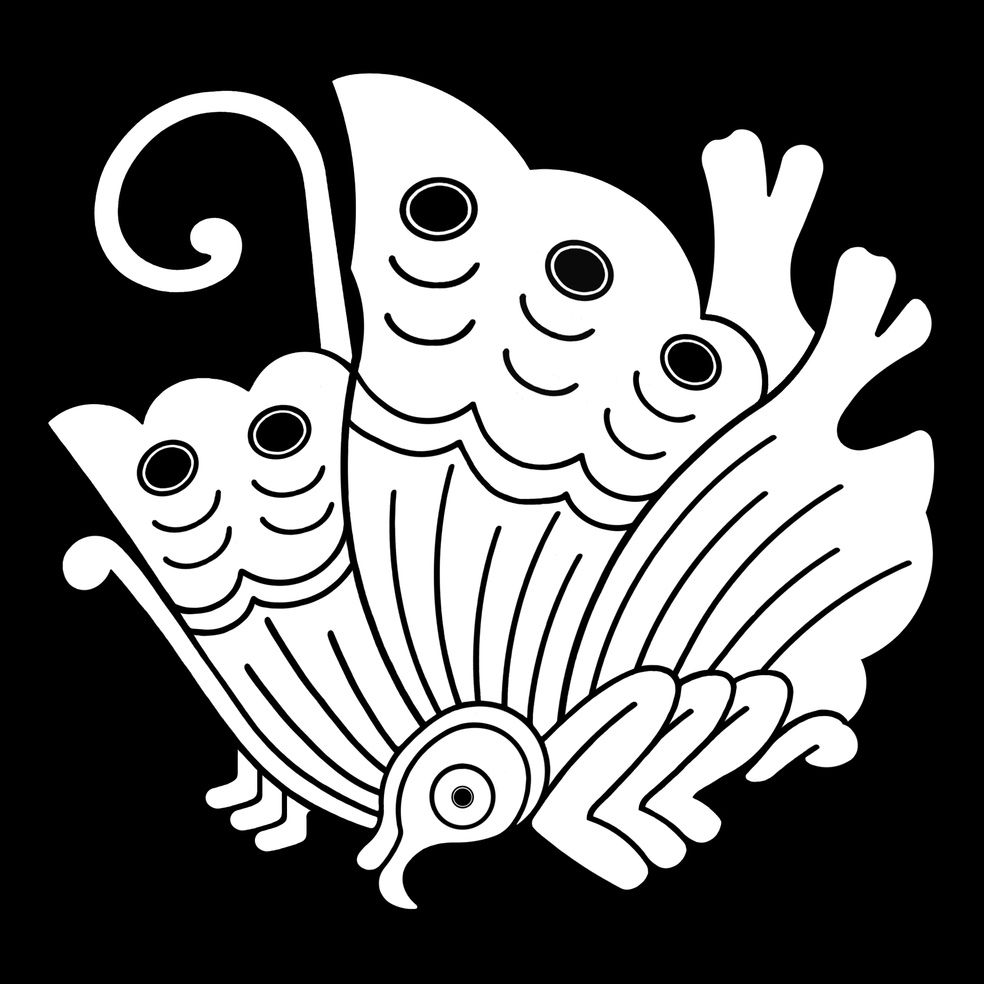 「揚羽」紋（染抜）